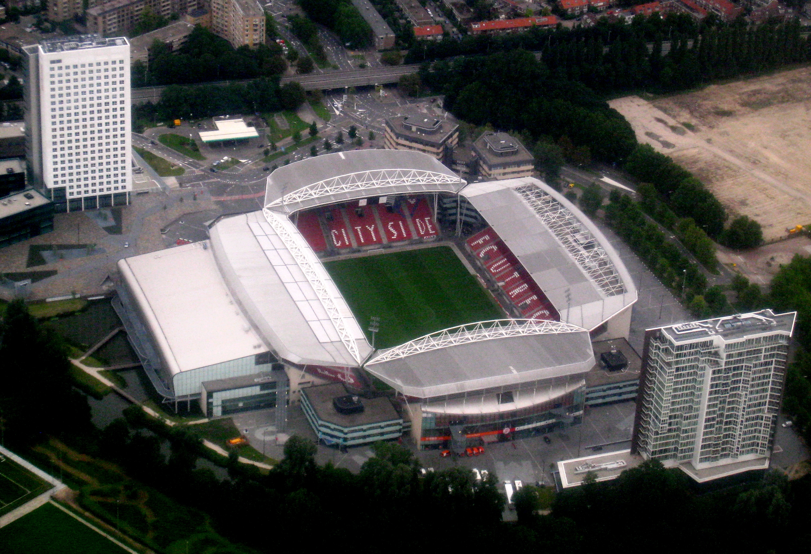 Stadion Galgenwaard in Utrecht vanuit het oosten